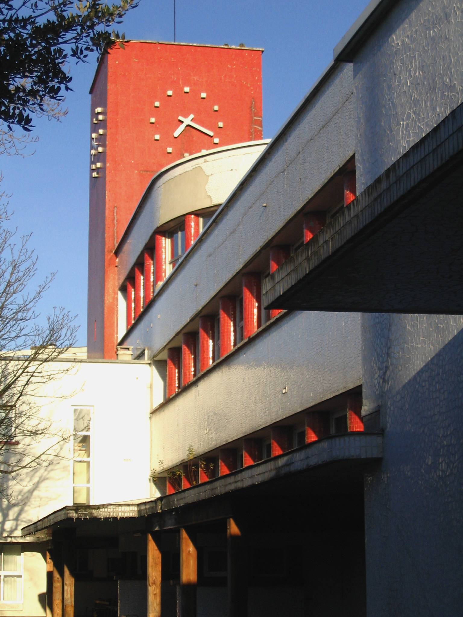 Lycée Condorcet - Maisons-Alfort - France Auteur/Author: P Charpiat 2006